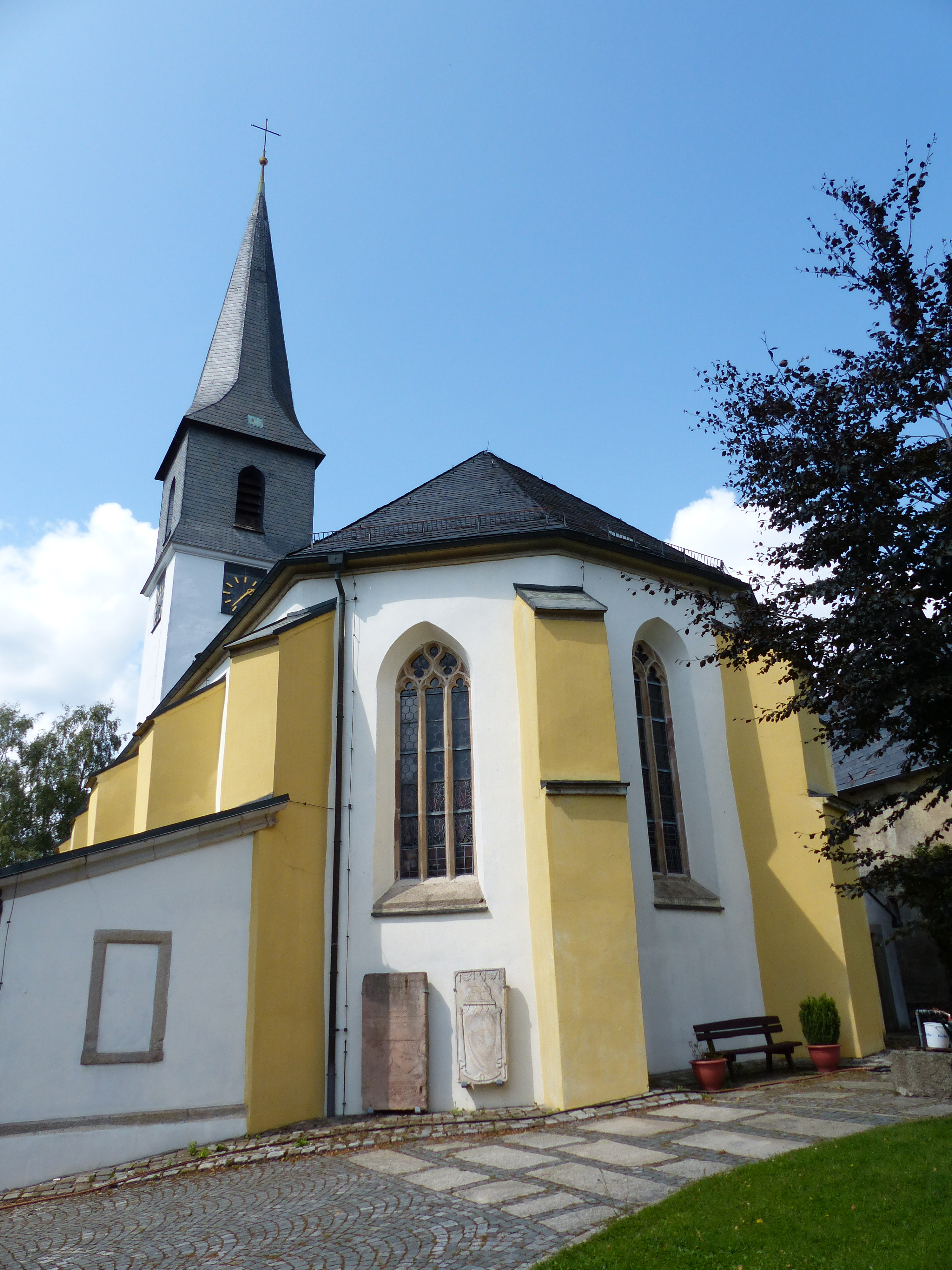 Ansicht aus dem Gemeindegebiet Konradsreuth, Landkreis Hof